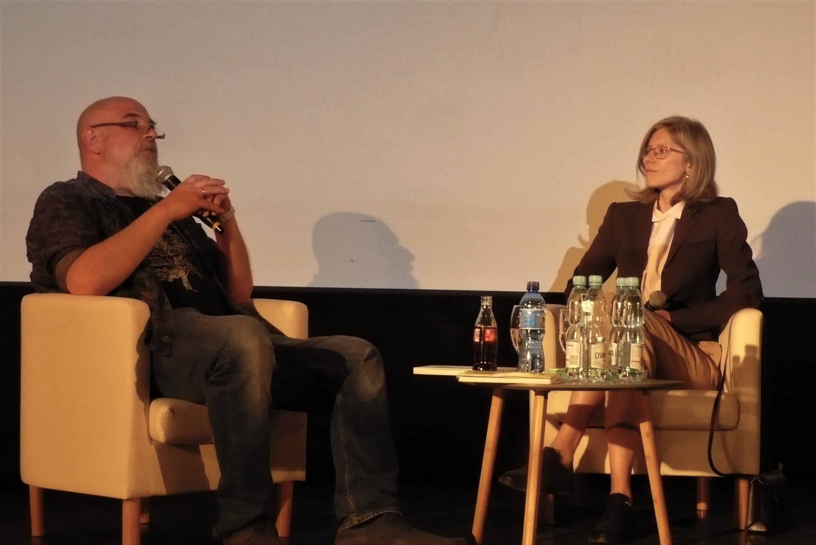 Irek Grin i Agnieszka Wolny-Hamkało, VI Festiwal Góry Literatury, Nowa Ruda, 2020